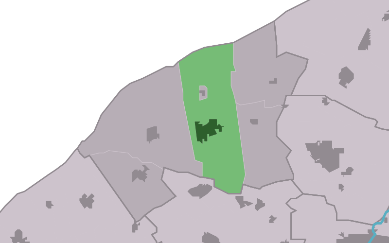 Kaartsje fan himrik fan Sint_Anne